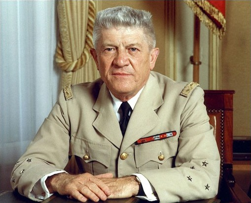 Le général René Imbot à son bureau de Chef d'Etat-major de l'armée de Terre, mars 1983.